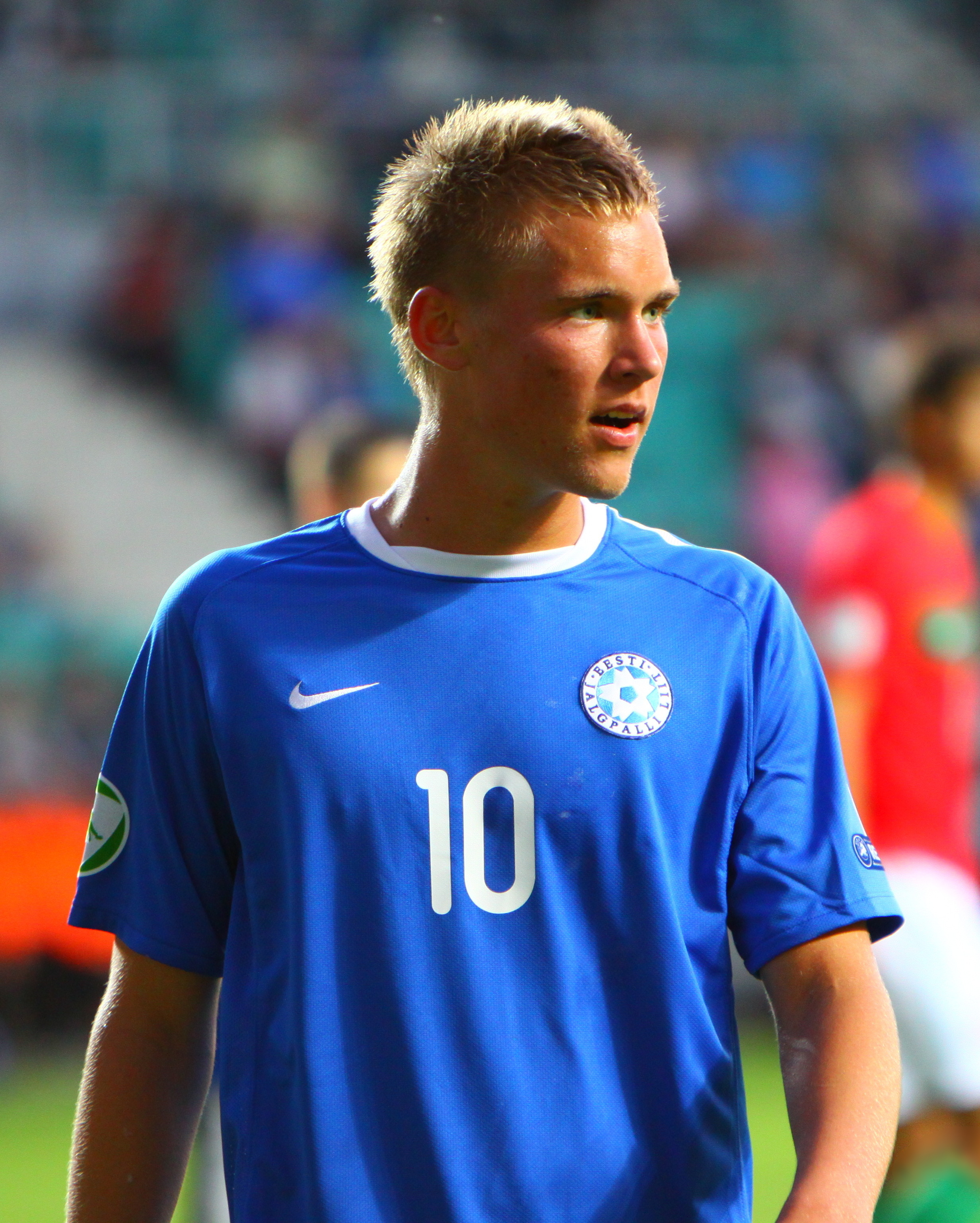 U-19 Estonia vs Portugal.